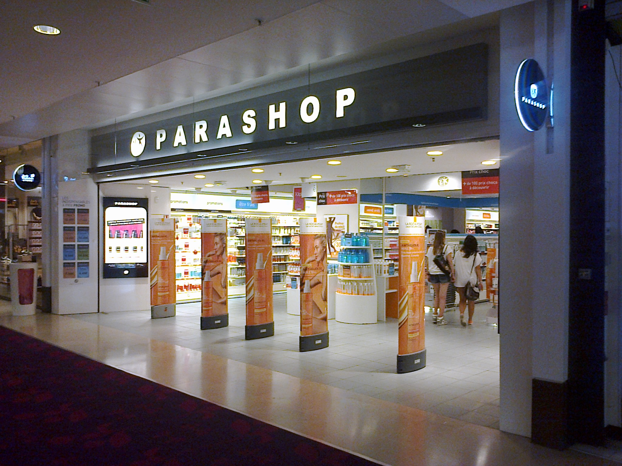 Magasin Parashop - Les Quatre Temps - La Défense